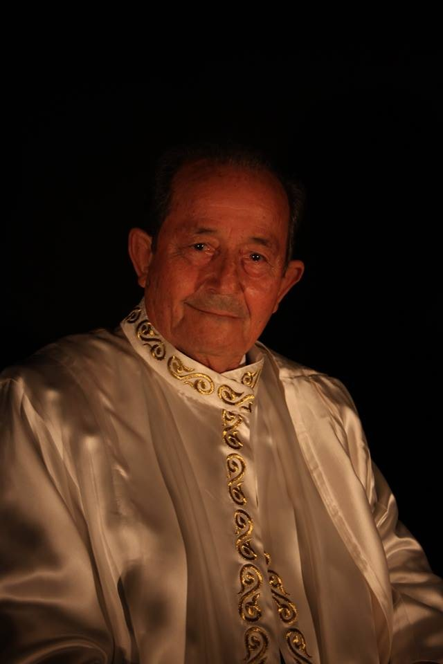 Mithat Özsan, Çukurova Üniversitesi kurucu rektörü, Adana